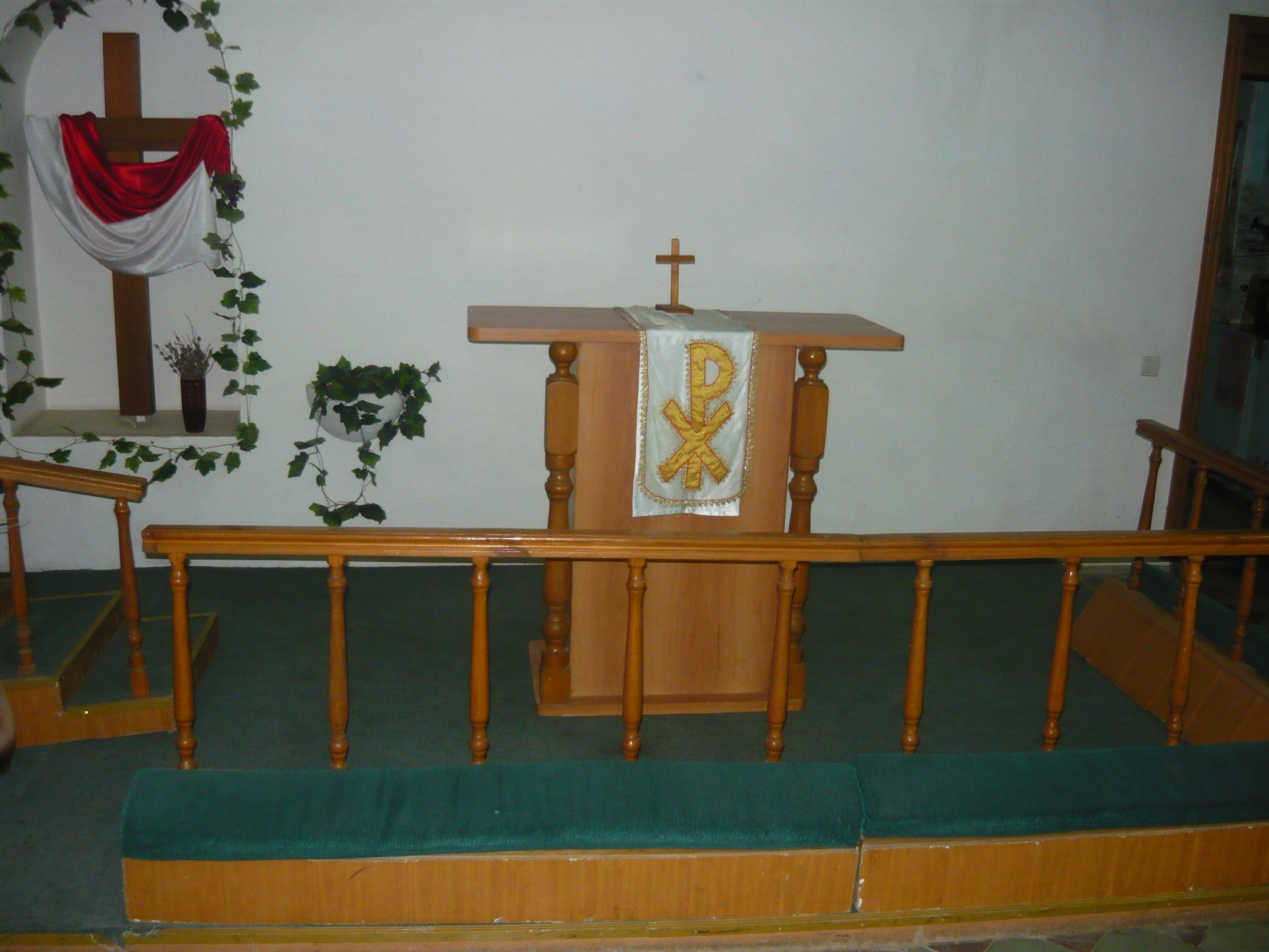 Татарча/tatarça: Казан протестант (лютеран) чиркеве